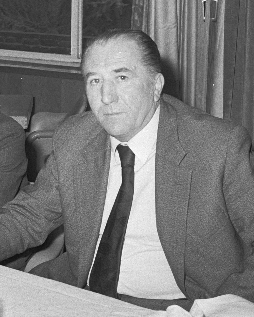 Voetbalclub Juventus (Italie) in Enschede; hulptrainer Čestmír Vycpálek.